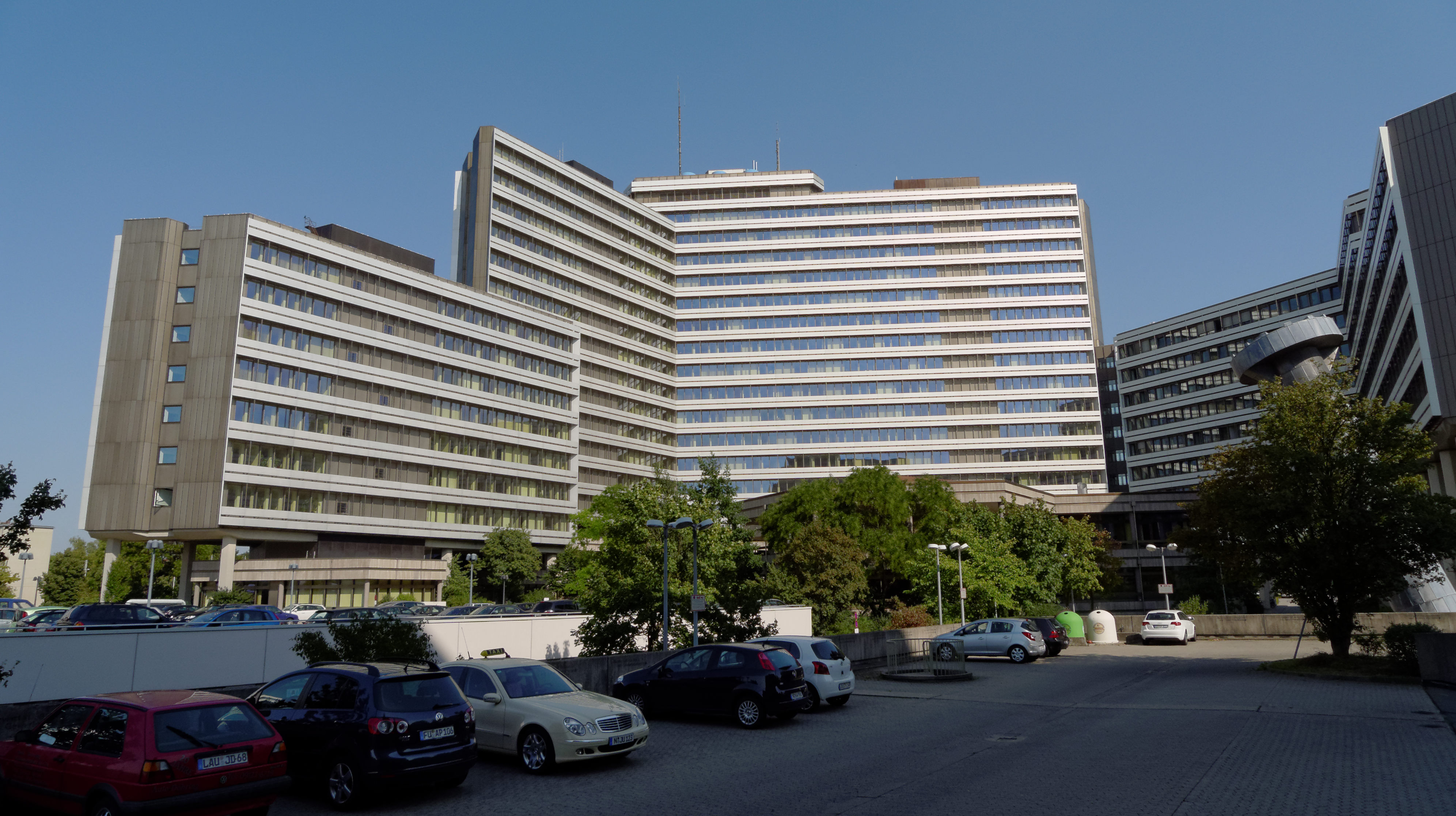 Nordwestansicht der Bundesanstalt für Arbeit in Nürnberg